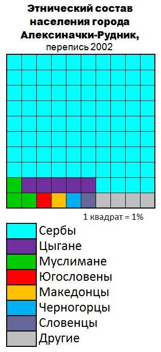 Этнический состав населения города Алексиначки-Рудник (2002)